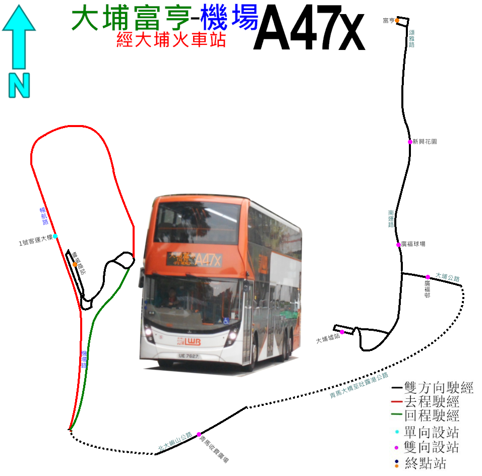 中文（香港）: 龍運巴士A47X線的走線圖